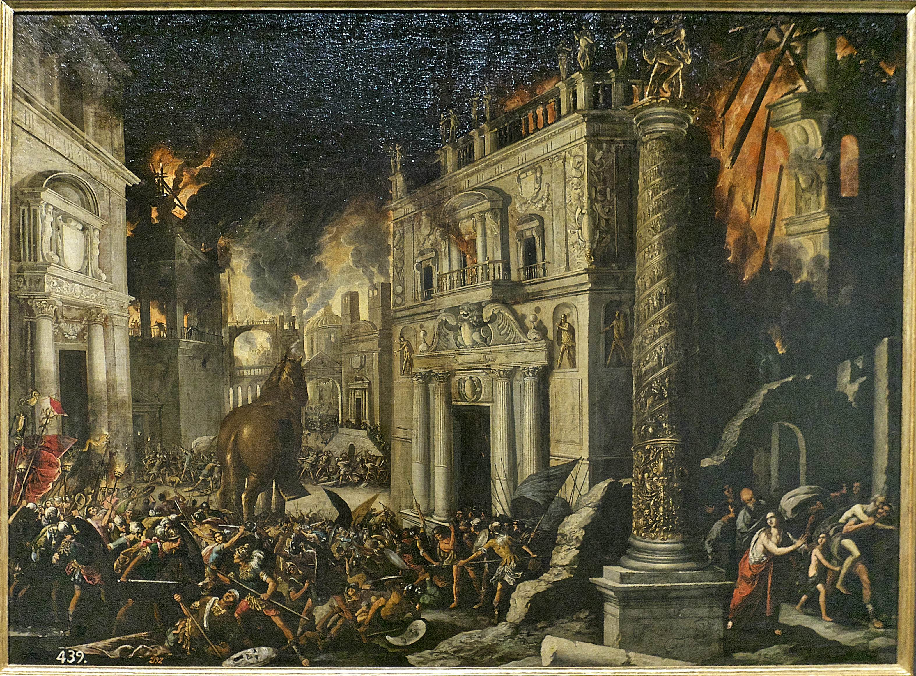 Los troyanos engañan a los griegos con el Caballo de Troya. Óleo sobre lienzo de Francisco Collantes, primera mitad del XVII, para el Palacio del Buen Retiro.